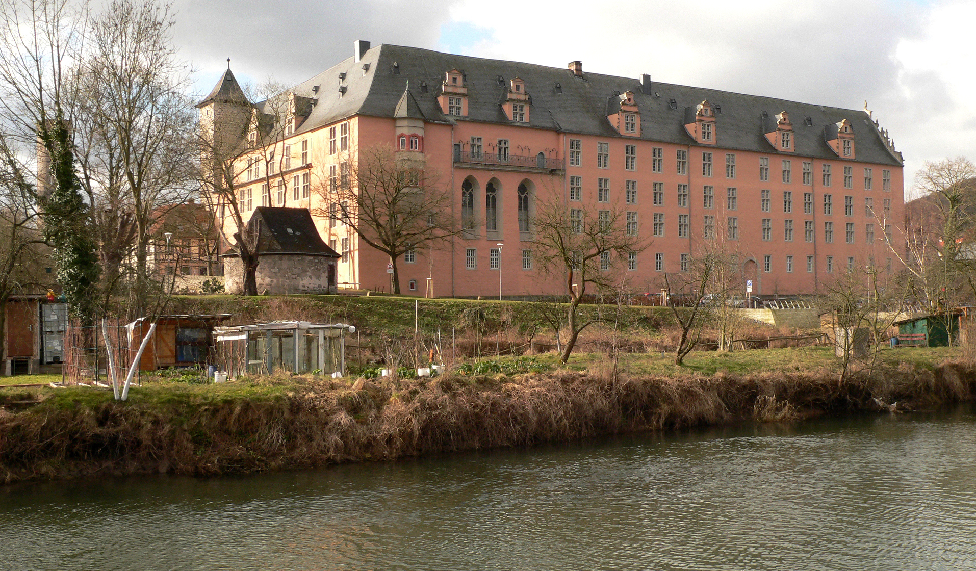 Welfenschloss Münden mit Werra und Blümer Werder)